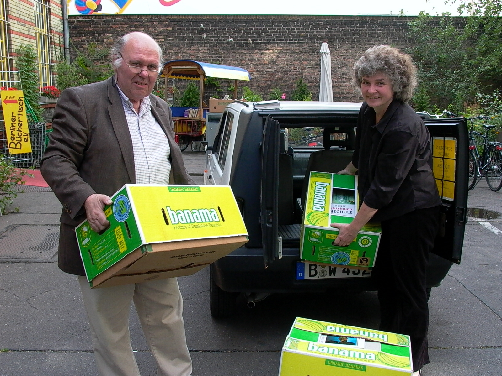 Reimar Delley und Ana Lichtwer bei der Buchabholung für den Berliner Büchertisch